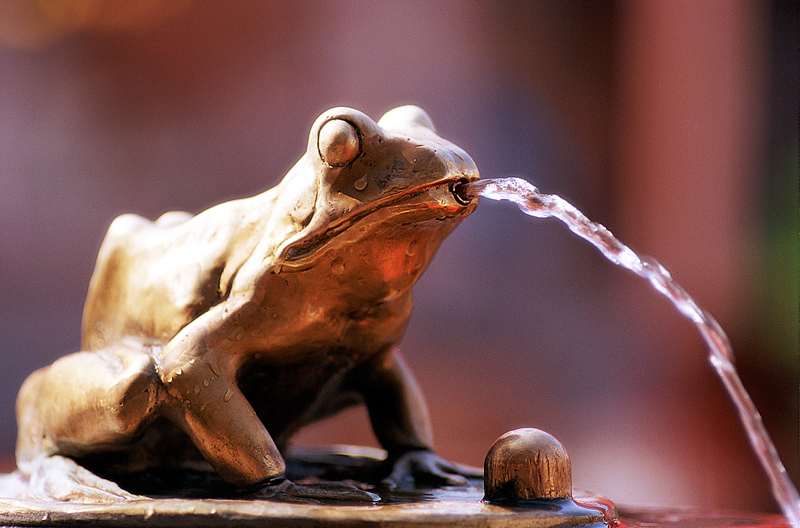 Toruń, Rynek Staromiejski, pomnik flisaka